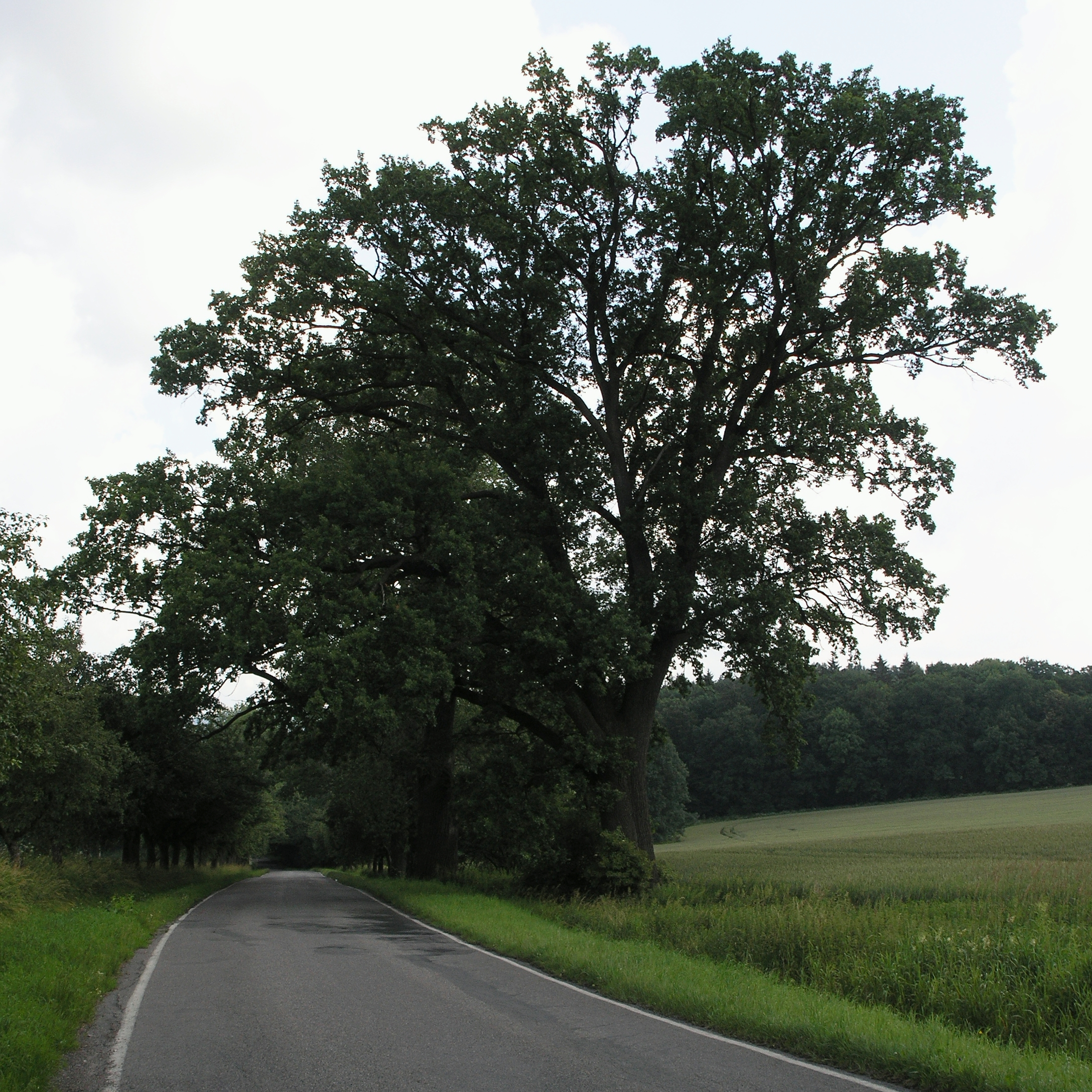 Žižkovy duby při cestě z Chotěboře do Libice